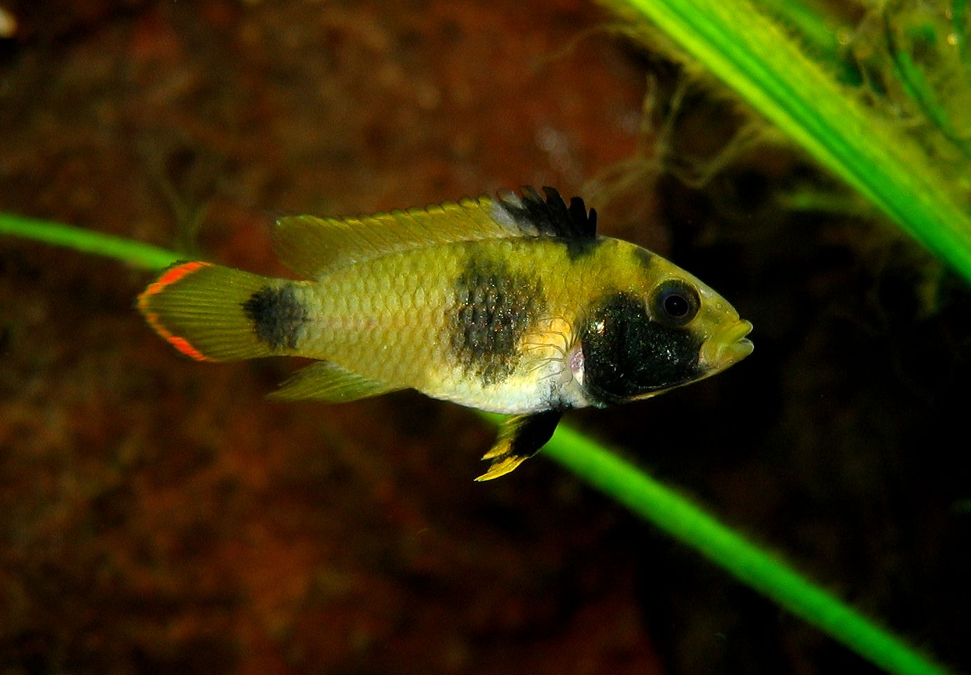 female Apistogramma nijsseni in mating colors